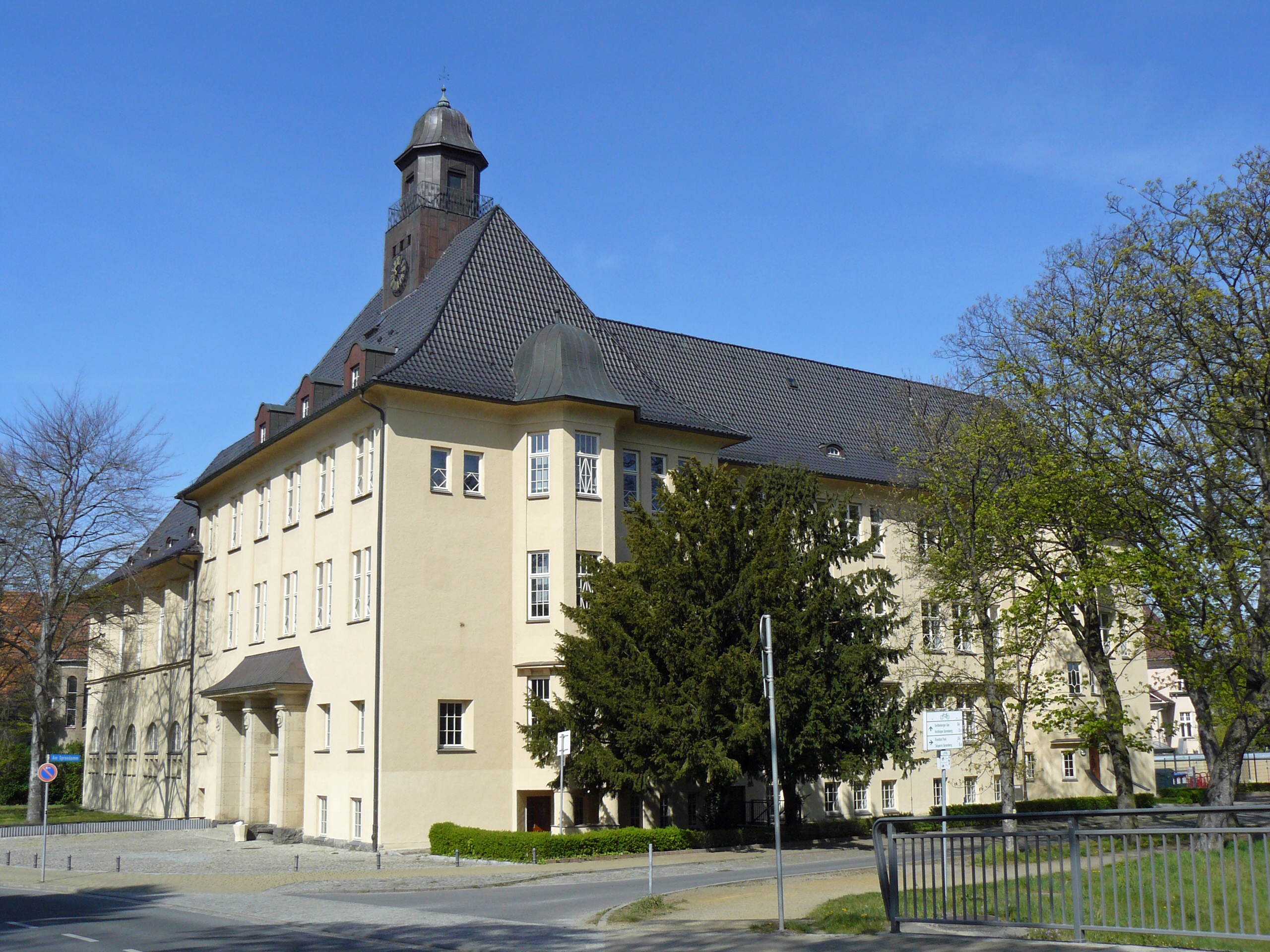 Erwin-Strittmatter-Gymnasium (Mittelstraße) in Spremberg/ Niederlausitz